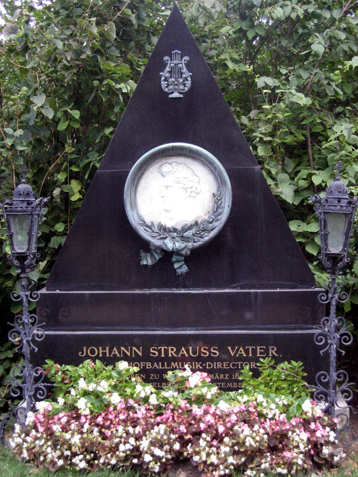 Wien Zentralfriedhof, Ehrengrab, Johann Strauss Vater Photo made by user -- skINMATE